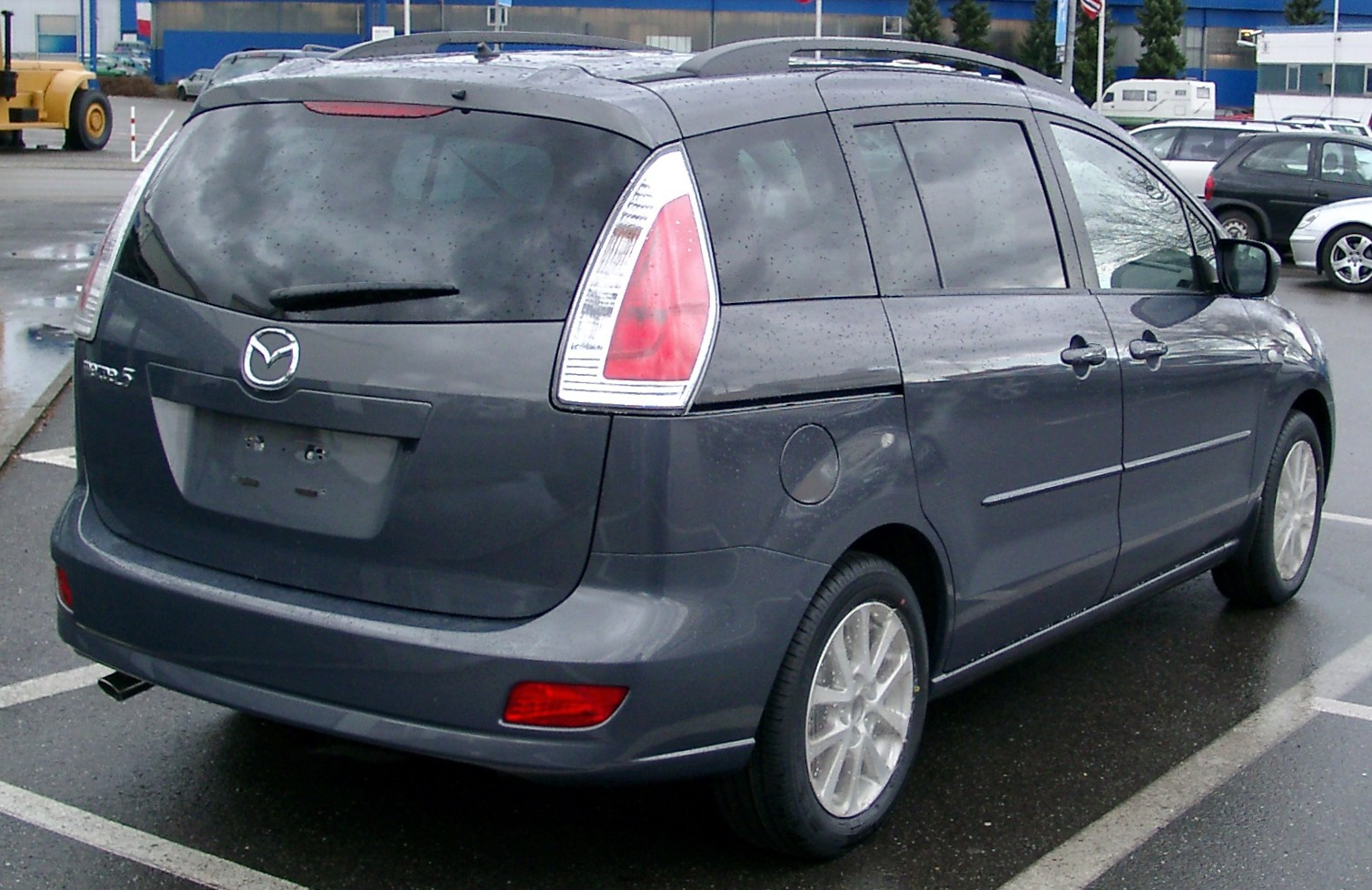 Mazda 5